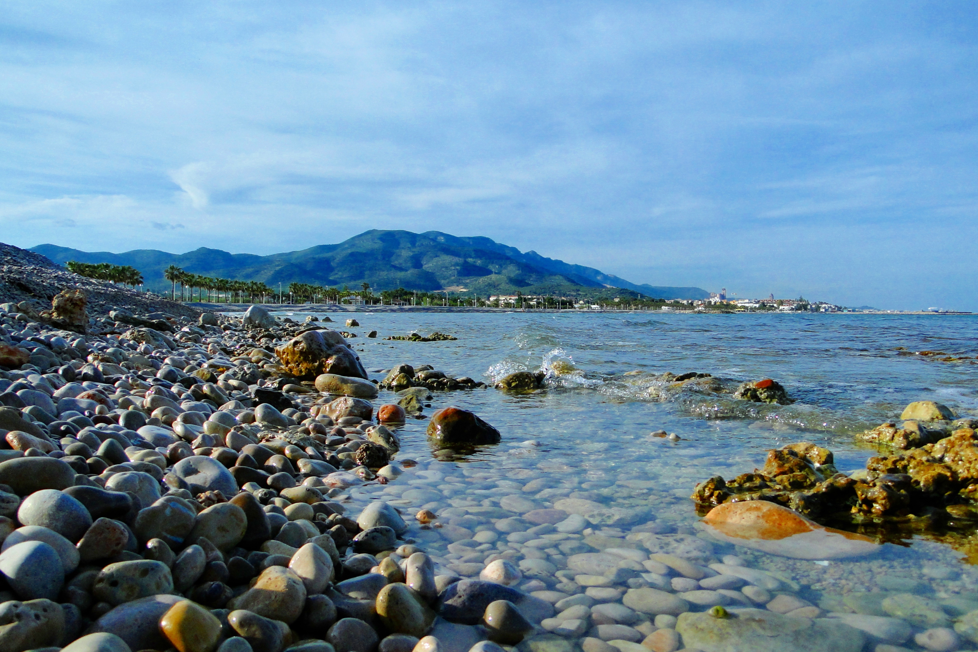 Vista de la Serra del Montsià des de la Platja del Montsià, foto presa arran d'aigua.